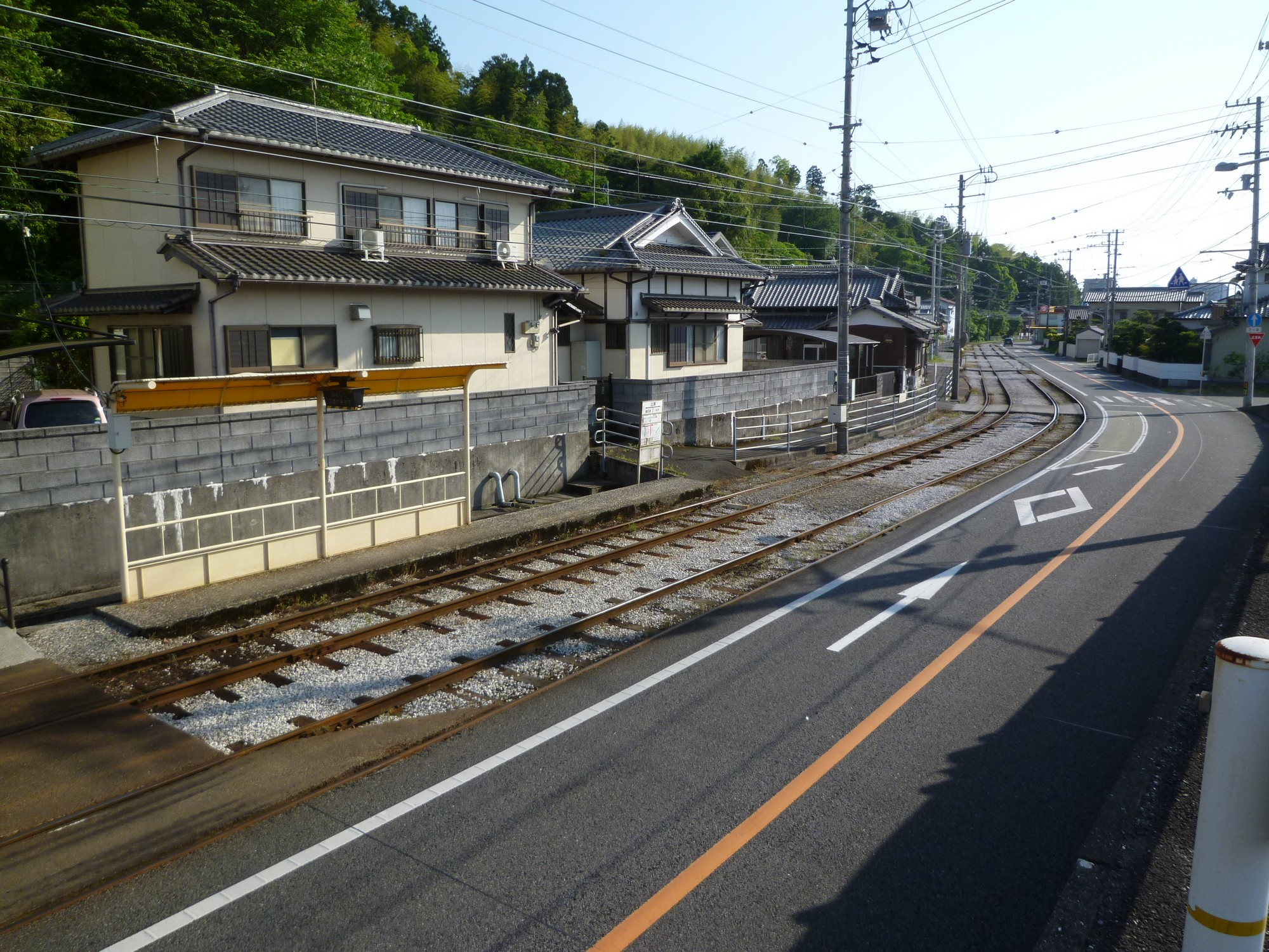 2015年5月8日撮影。